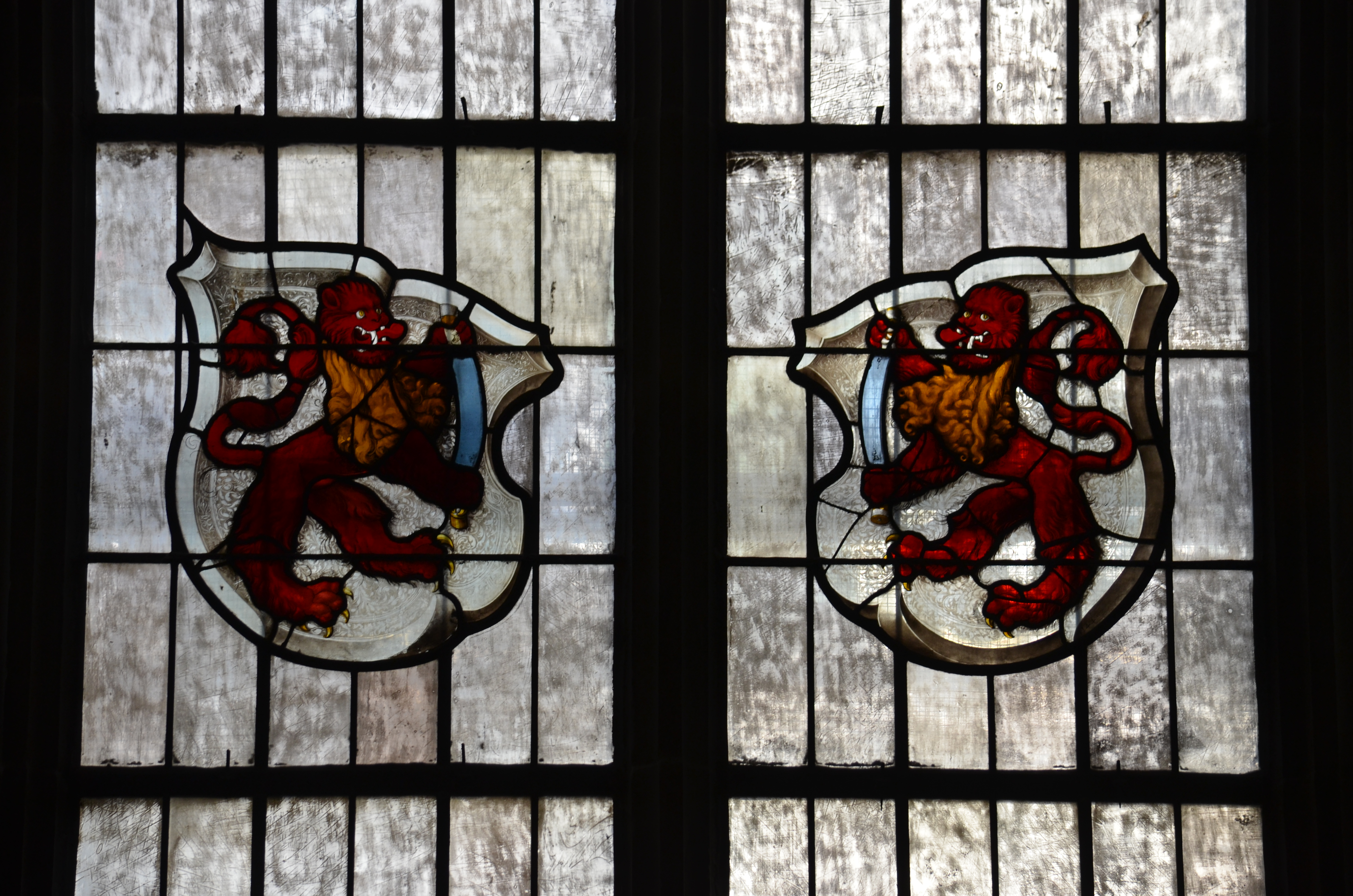 Bern, Münster, Gerwernkapelle, Wappen Mittellöwen